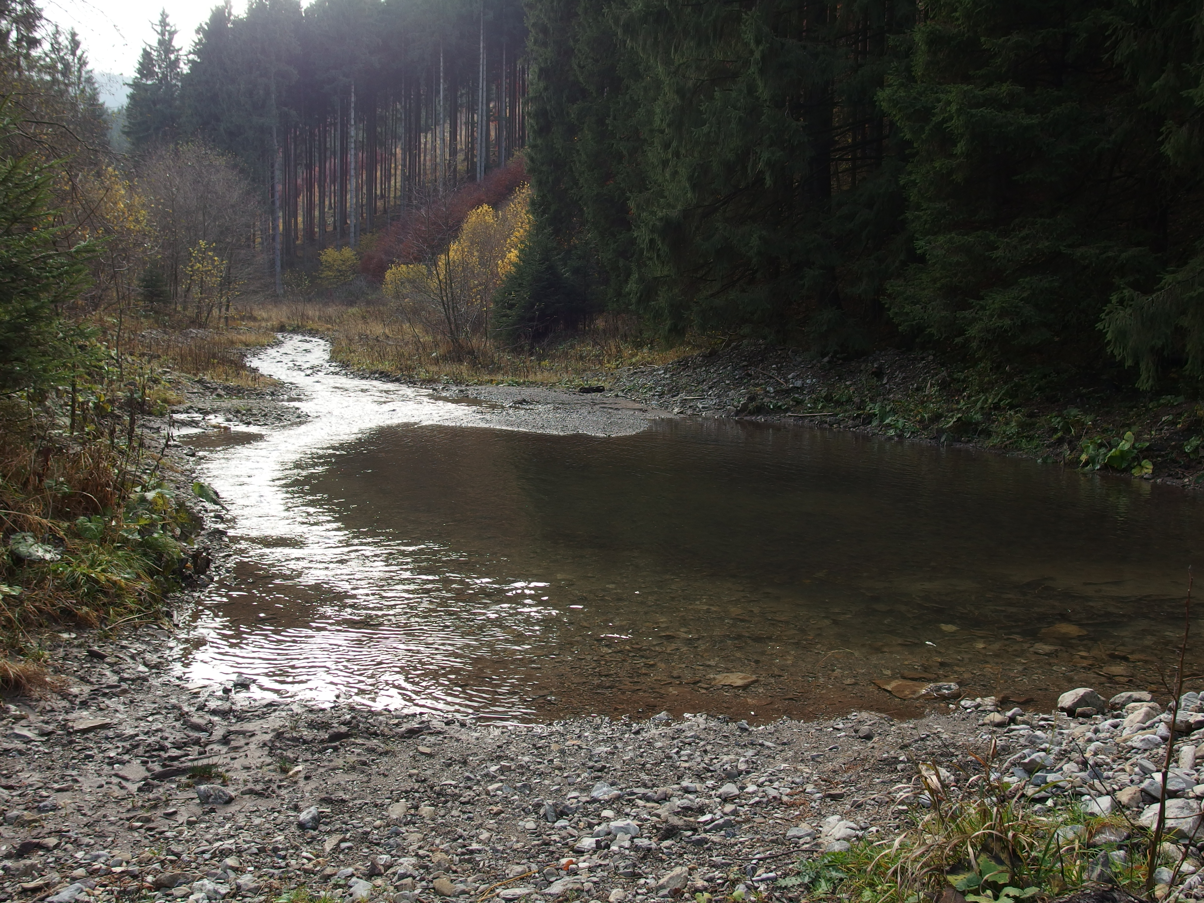 Porubský potok